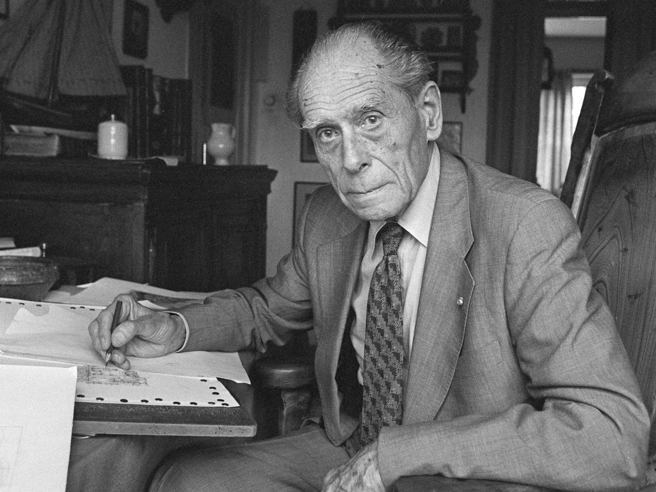 Tekenaar Anton Pieck 85 jaar; Anton Pieck in zijn werkkamer 18 april 1980